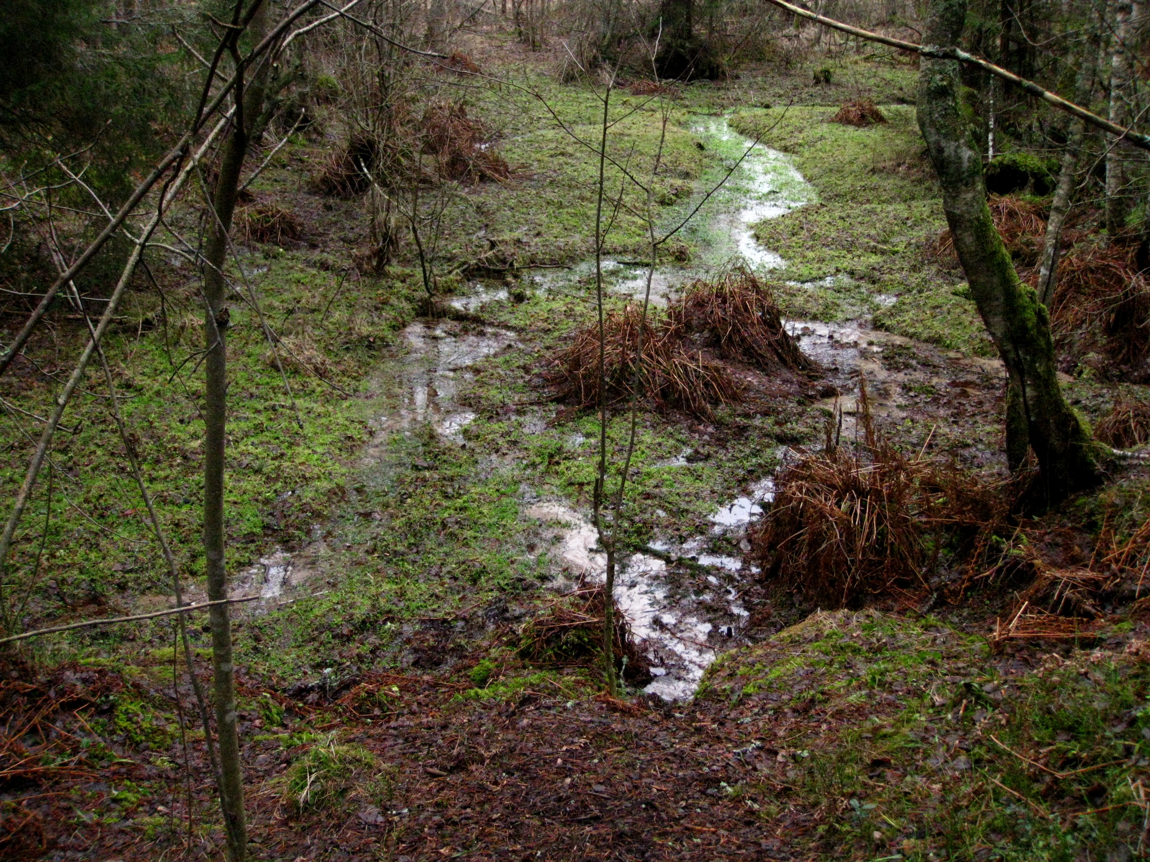 Kasetuka allikad